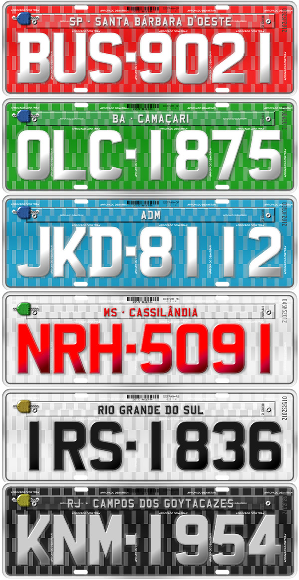 Placas coloridas, conforme parâmetros do Contran.